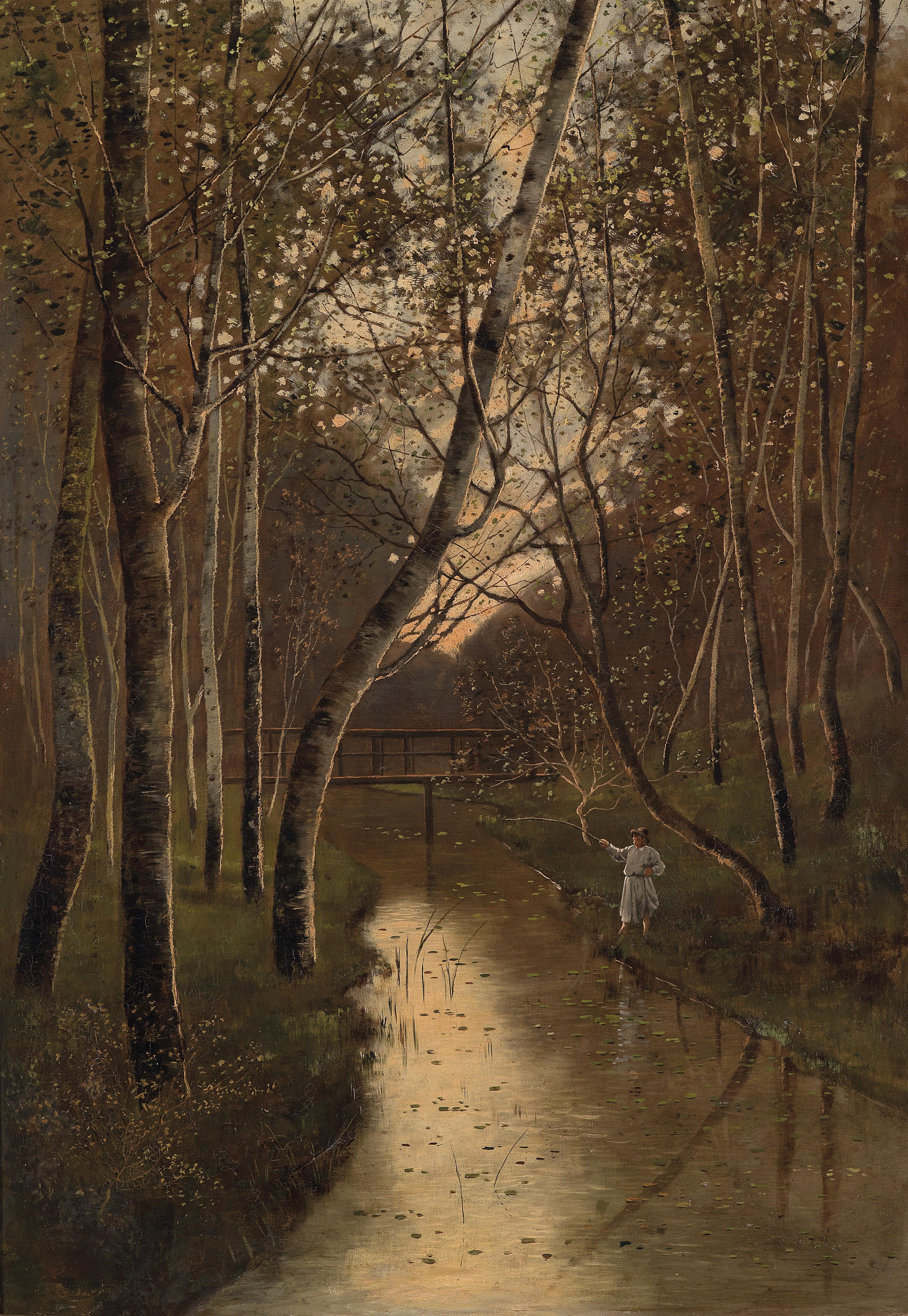 Waldlandschaft mit Angler am Flussufer, Signaturreste M..., rückseitig bezeichnet Mesterhazy Kalman...., Öl auf Leinwand, 70 x 100 cm